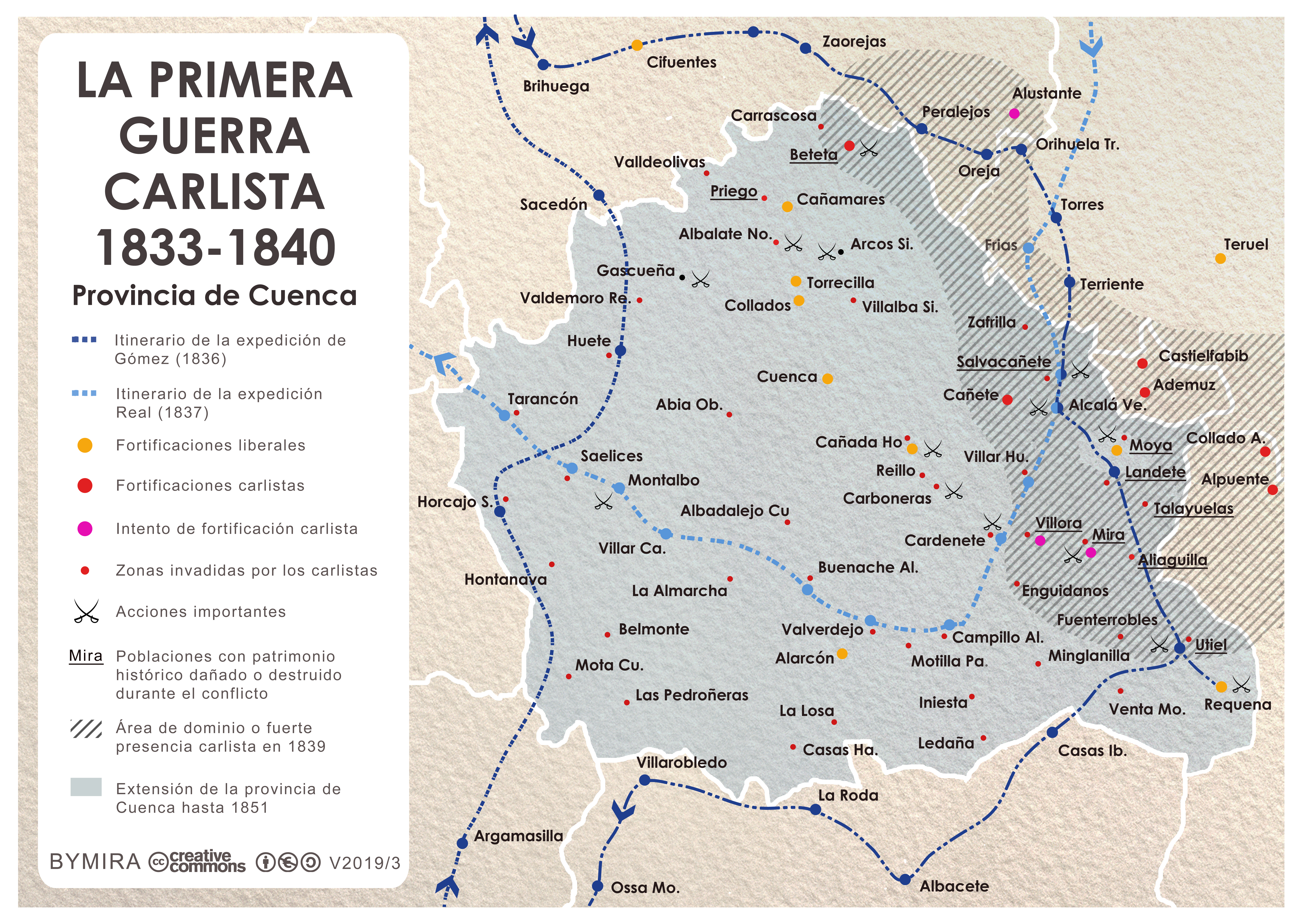 MAPA PRIMERA GUERRA CARLISTA PROVINCIA DE CUENCA